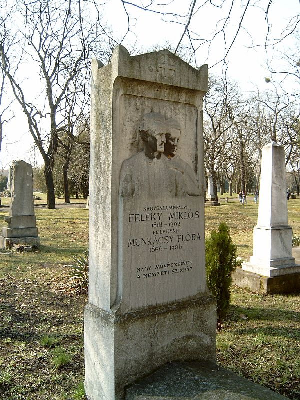 Feleky Miklós (Nagygalambfalva, 1818. dec. 18. – Bp., 1902. márc. 16.) színész, rendező és felesége Munkácsi Flóra; Feleky Miklósné (Baja, 1836. ápr. 29. – Bp., 1906. okt. 1.) színésznő, a Nemzeti Színház második nemzedékének tagja sírja Budapesten. Kerepesi temető: 29/1-1-14.